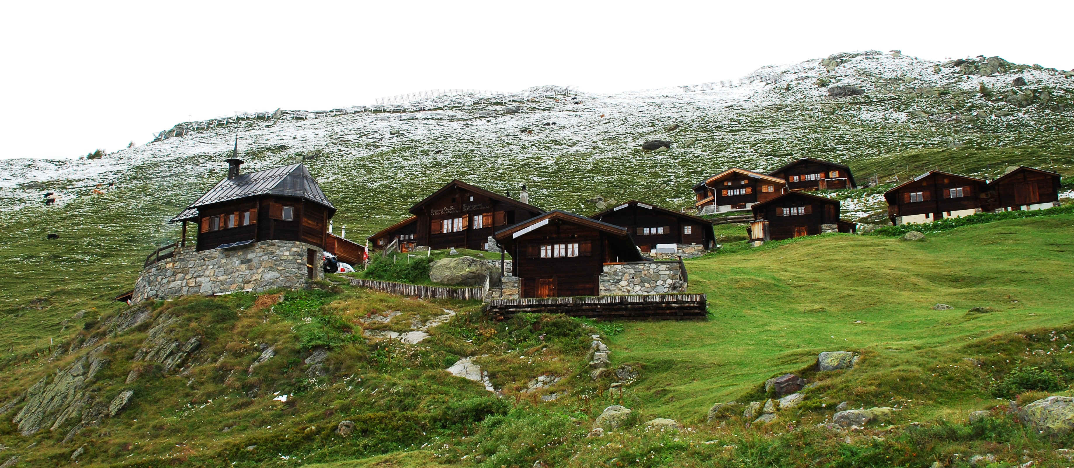 en.: Hockenalp at Lötschental, Switzerland; dt.: Hockenalp im Lötschental, Schweiz